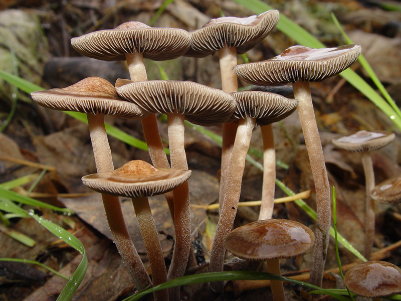 Panaeolus subbalteatus